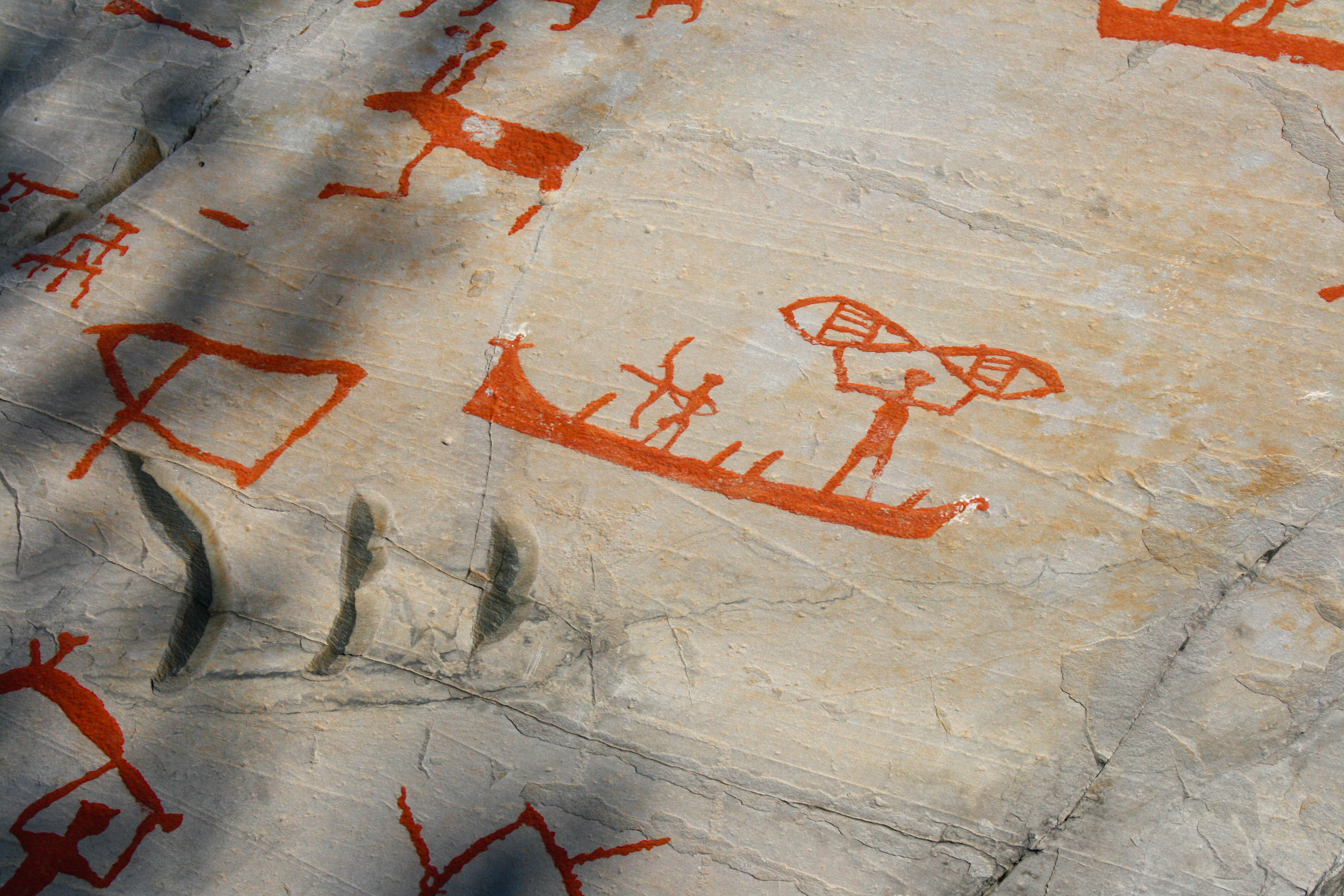 Helleristninger i Alta.